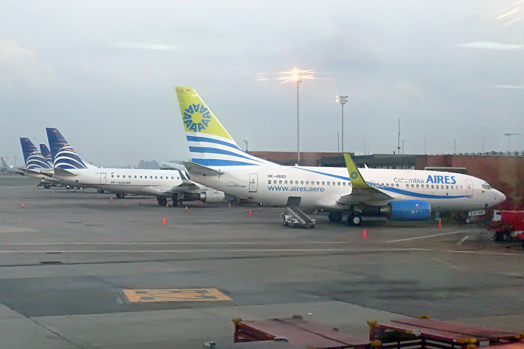 Fotografía del muelle nacional del Aeropuerto Internacional El Dorado de la ciudad de Bogotá, Colombia. Se pueden ver un B737-700 de Aires Colombia y 3 E190 de AeroRepública.